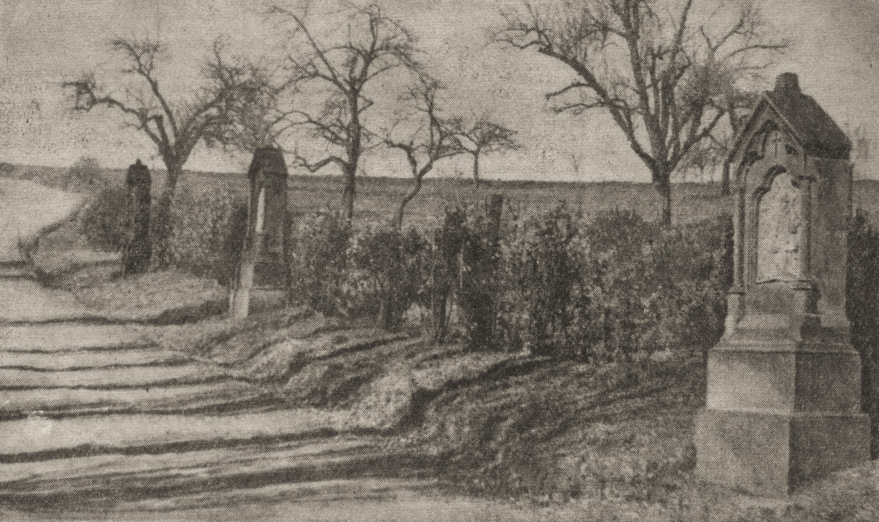 St. Josef und St. Wendelin (Diefflen), Kreuzweg zum Friedhof